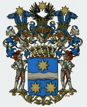 Герб баронов Вревских